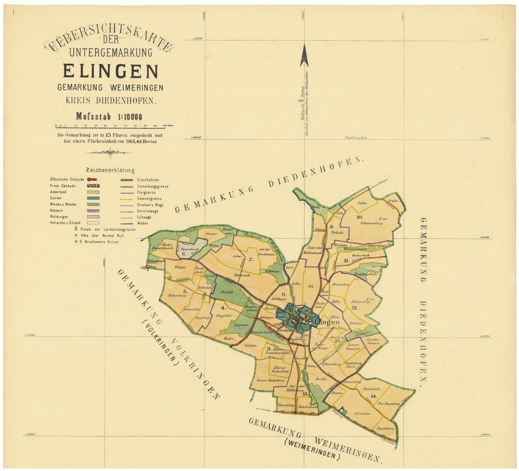 Plans cadastraux -- France -- Elange (Moselle)